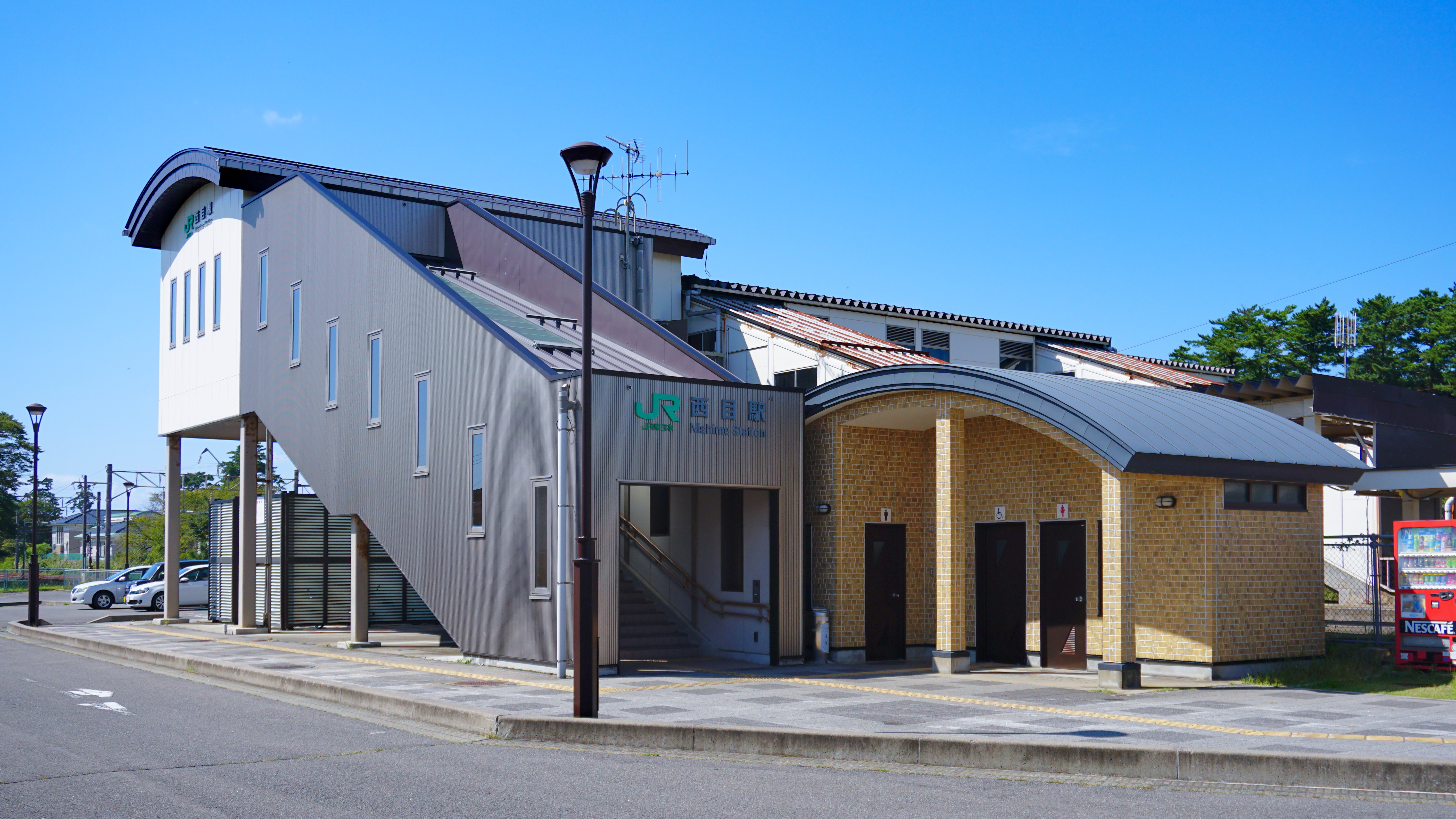 羽越本線 西目駅（秋田県由利本荘市）